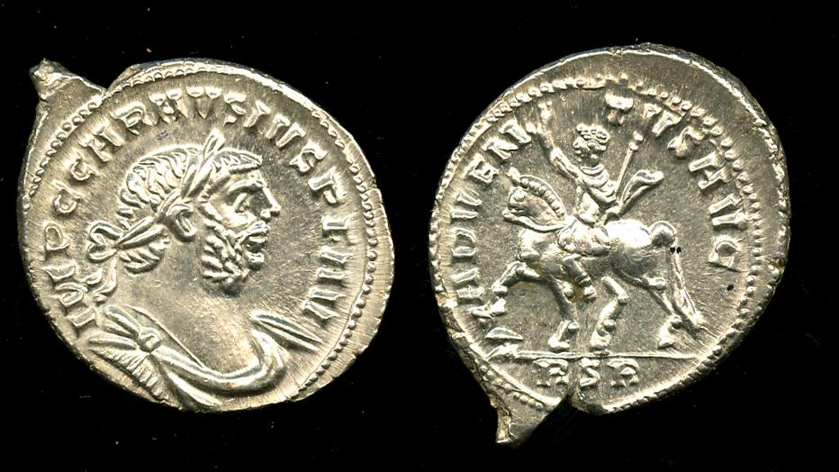 Silver denarius of Carausius Adventus (13 3) composite